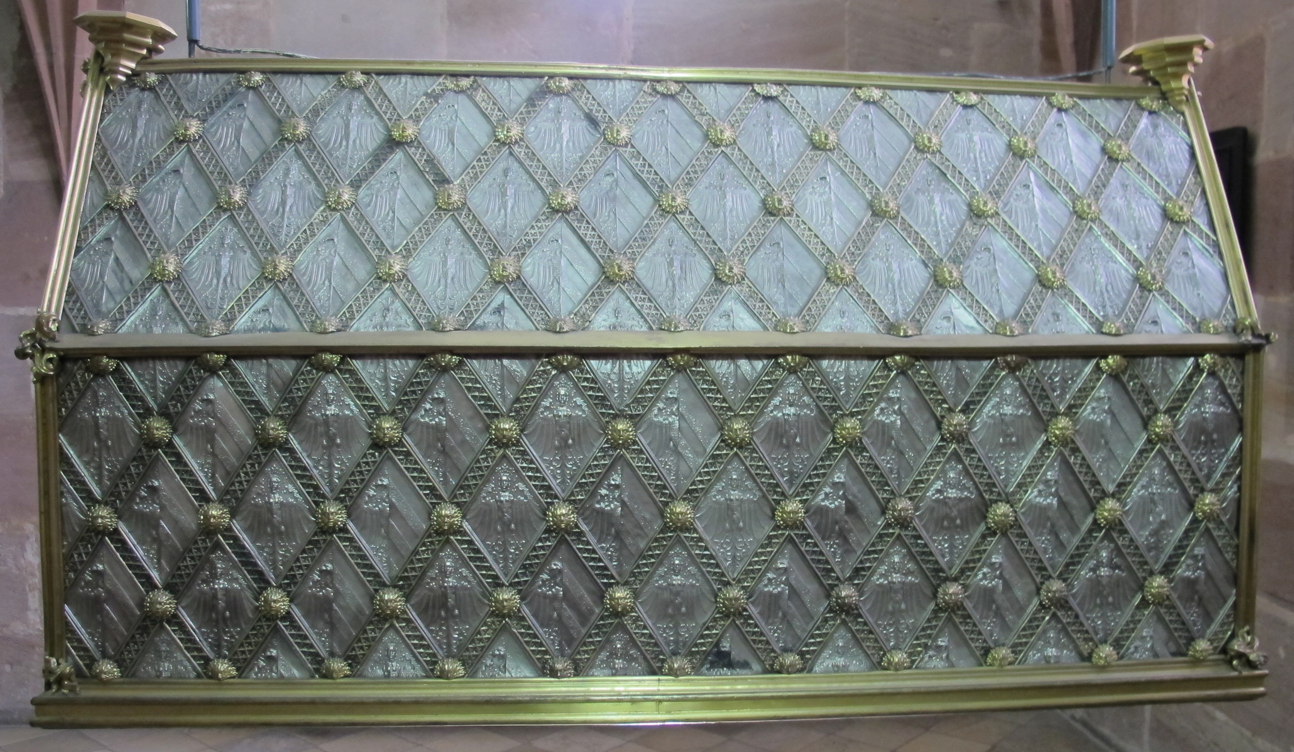 Reliquiario dei magi, norimberga, 1438-40